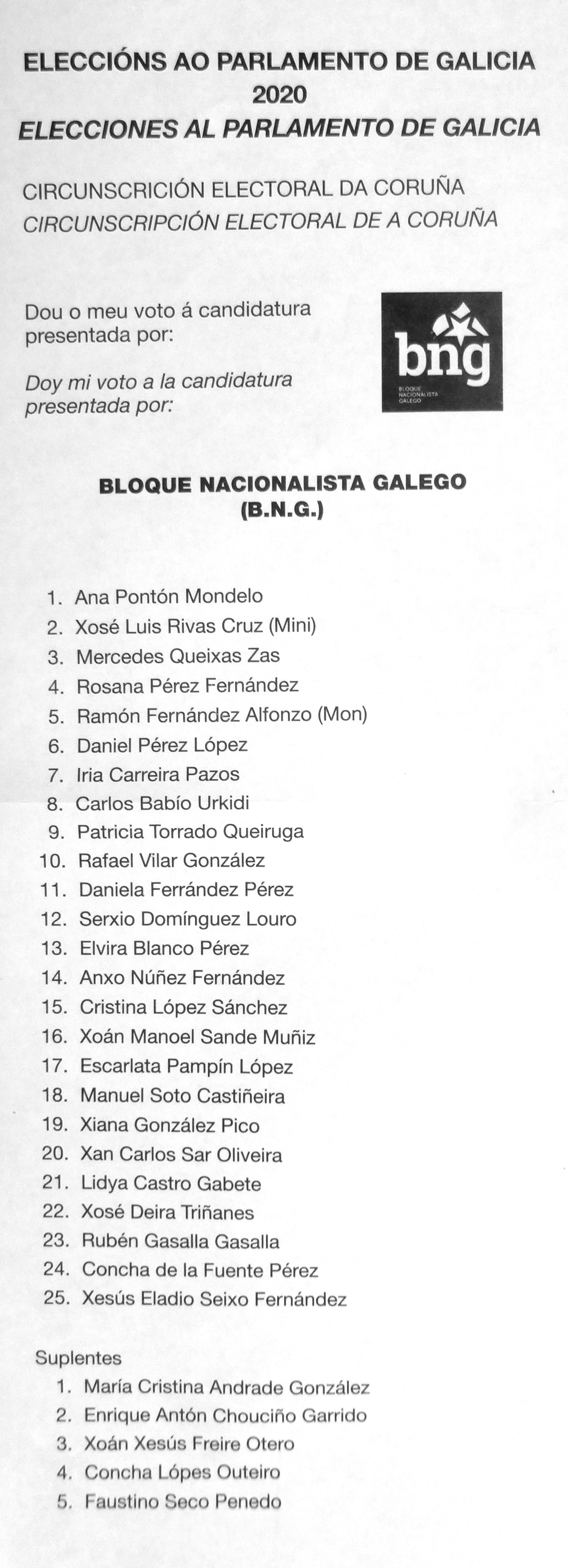 Papeletas electorais Eleccións ao Parlamento de Galicia 2020 circunscrición electoral da Coruña - xullo - BNG